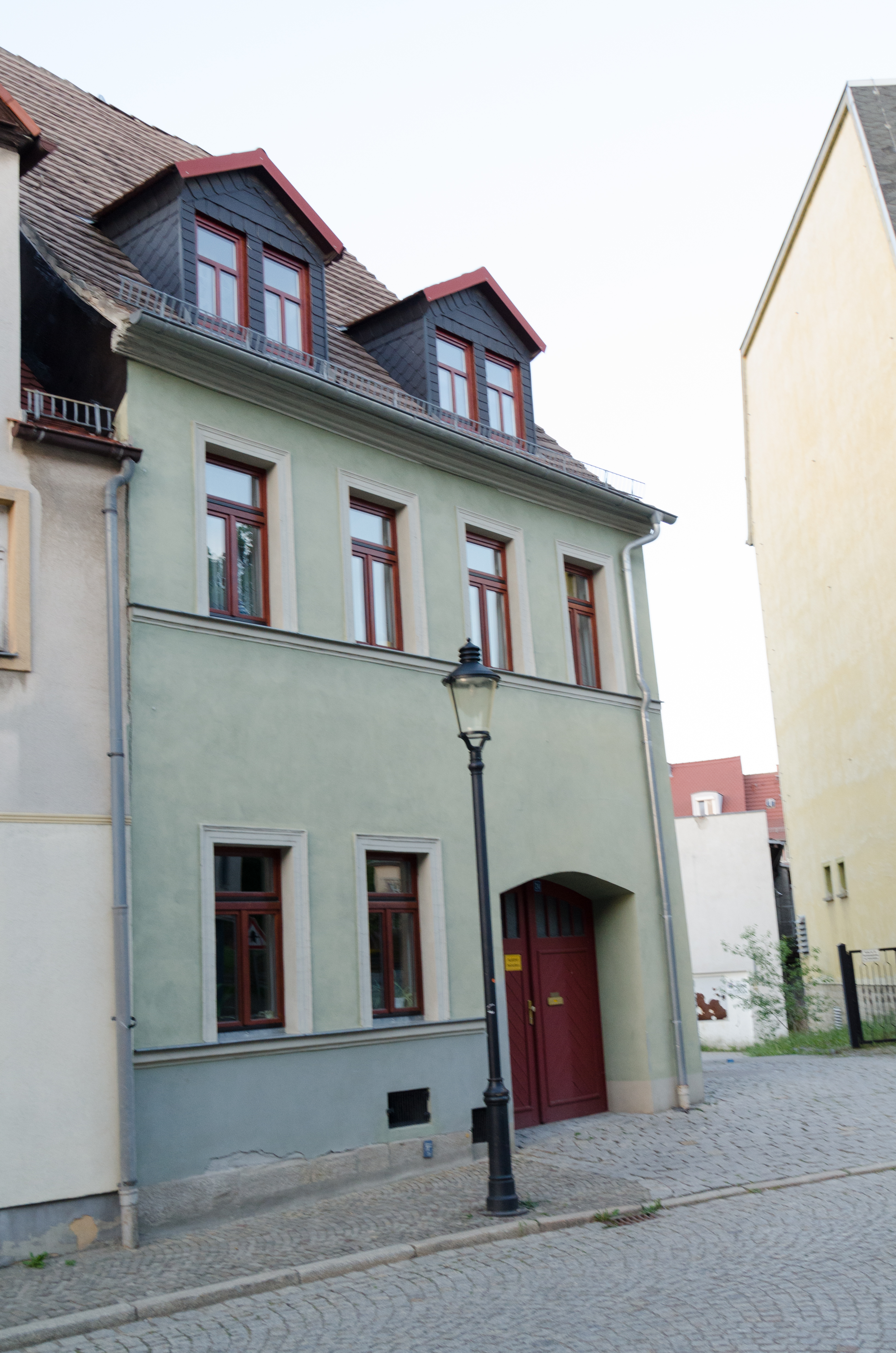 Naumburg, Wenzelstraße 24